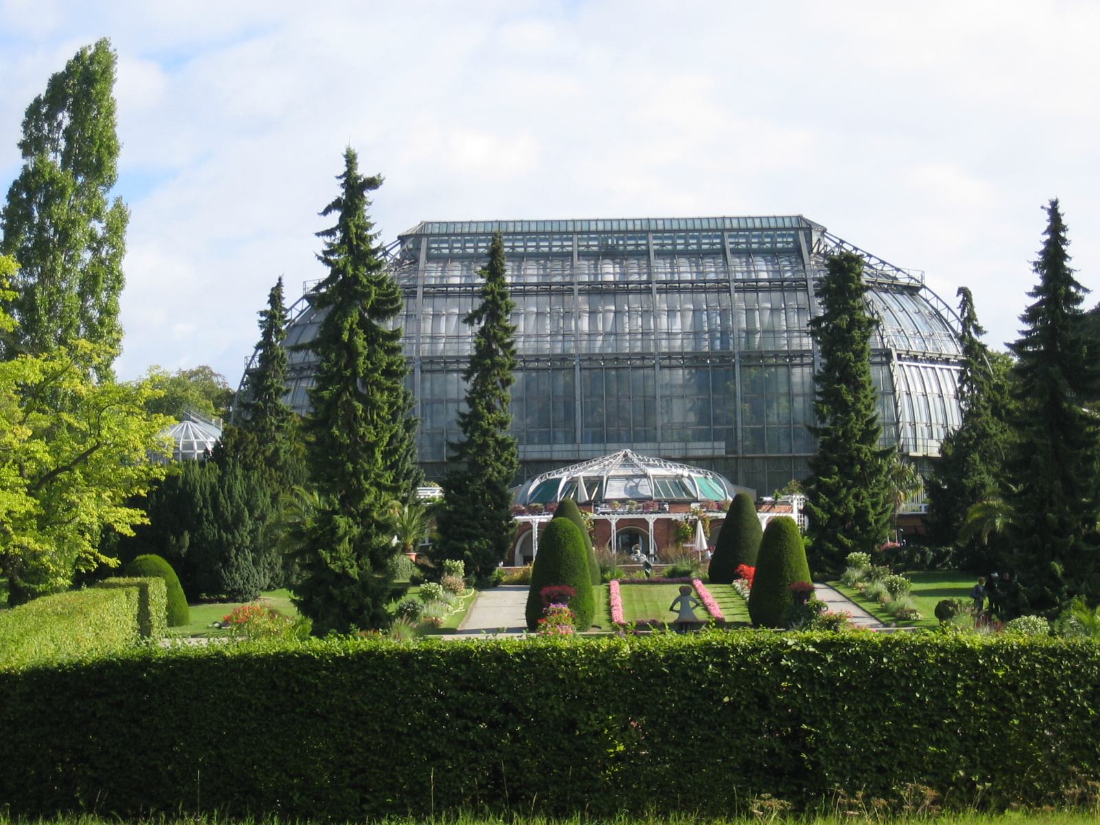 Großes Gewächshaus (Tropenhaus) im Botanischen Garten Berlin / Botanic Garden Berlin: Tropical Greenhouse